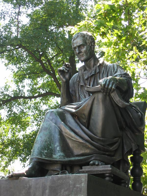 Statue de Jean-Jacques Rousseau à Genève (Suisse) par James Pradier